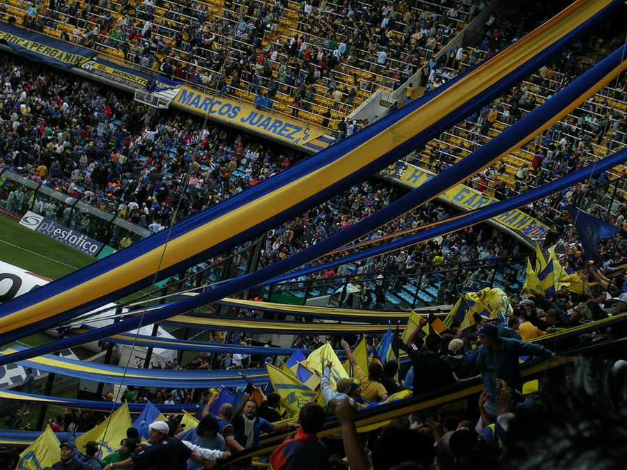 Barra Brava de La 12 en La Bombonera (Boca Juniors).